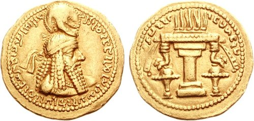 Dinar de Artaxes I